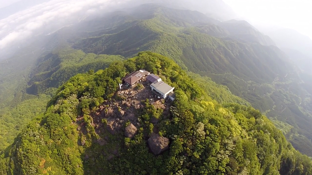 金時山上空から